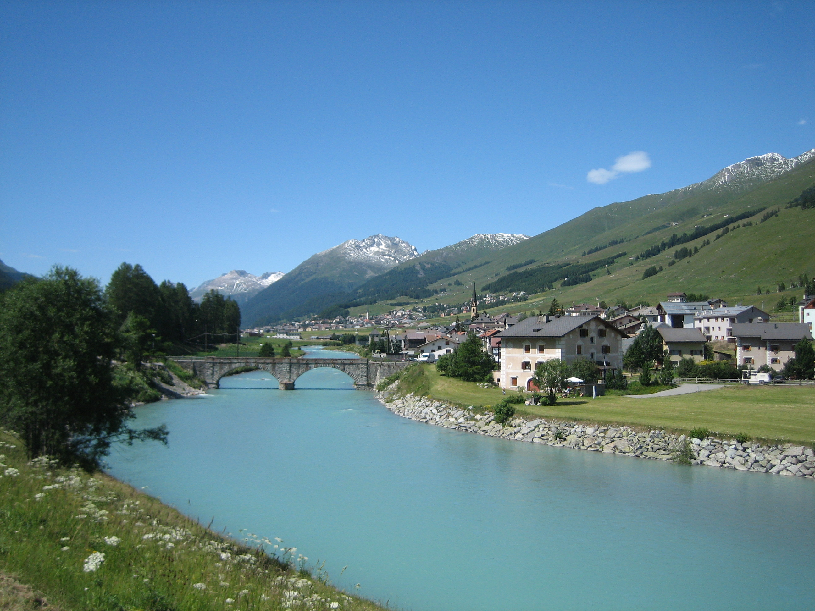 S-chanf, hinten Zuoz